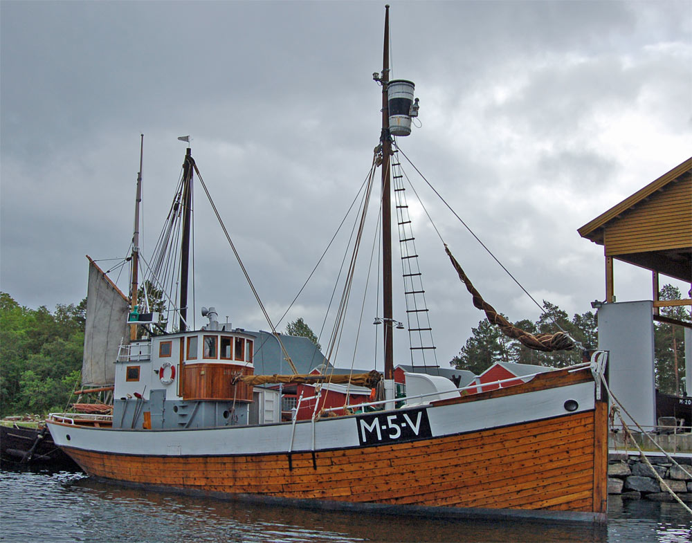 Die Heland im Sunnmøremuseum in Ålesund